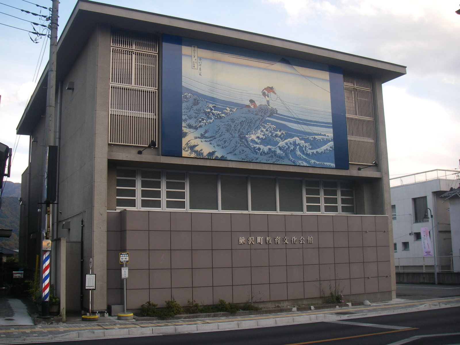 富士川町（旧：鰍沢町）教育文化会館。葛飾北斎の甲州石班澤が描かれている。panoramioより転載。